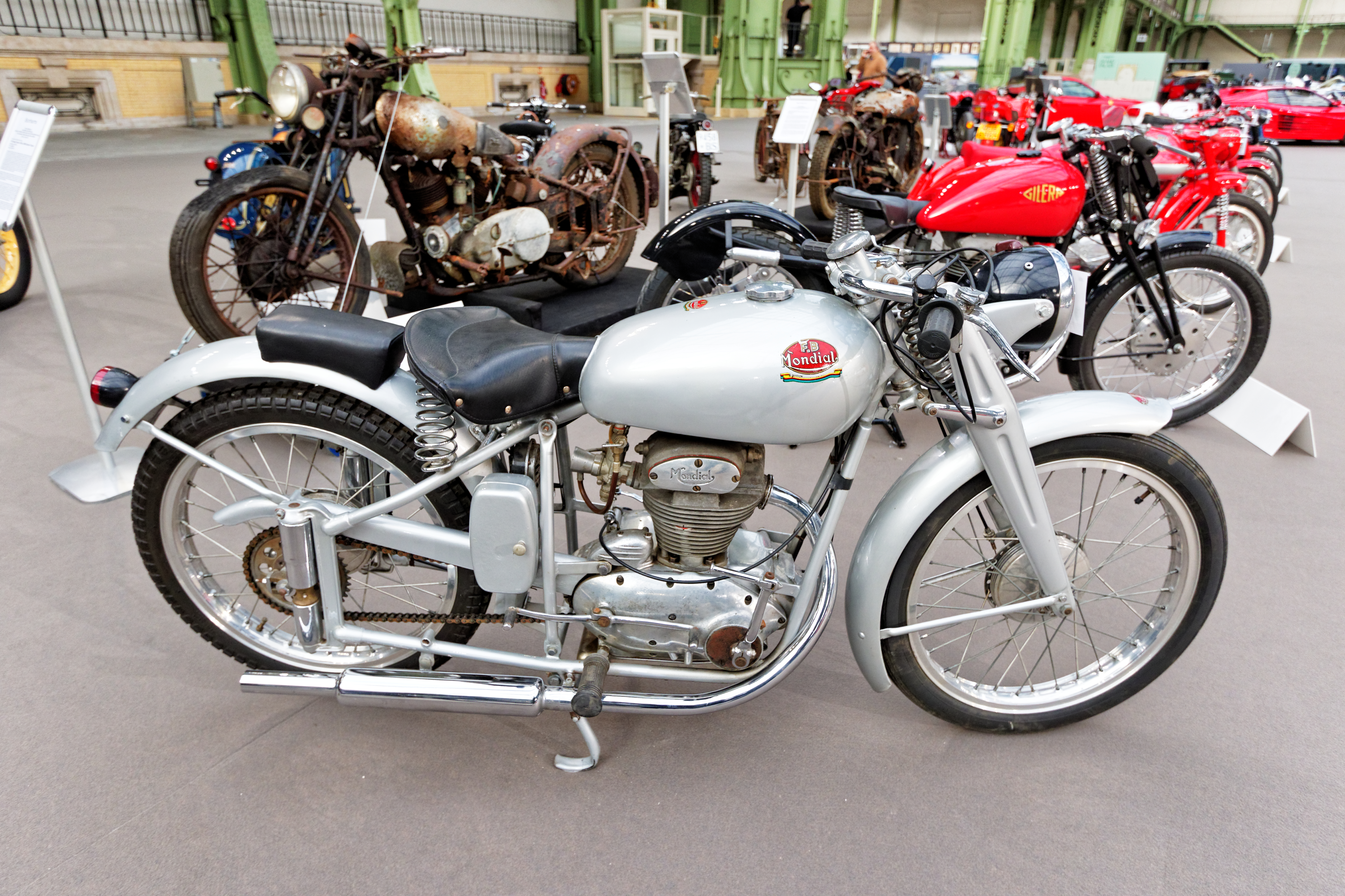 Un des véhicules présenté lors de la vente aux enchères Bonhams 2016 au Grand Palais de Paris.